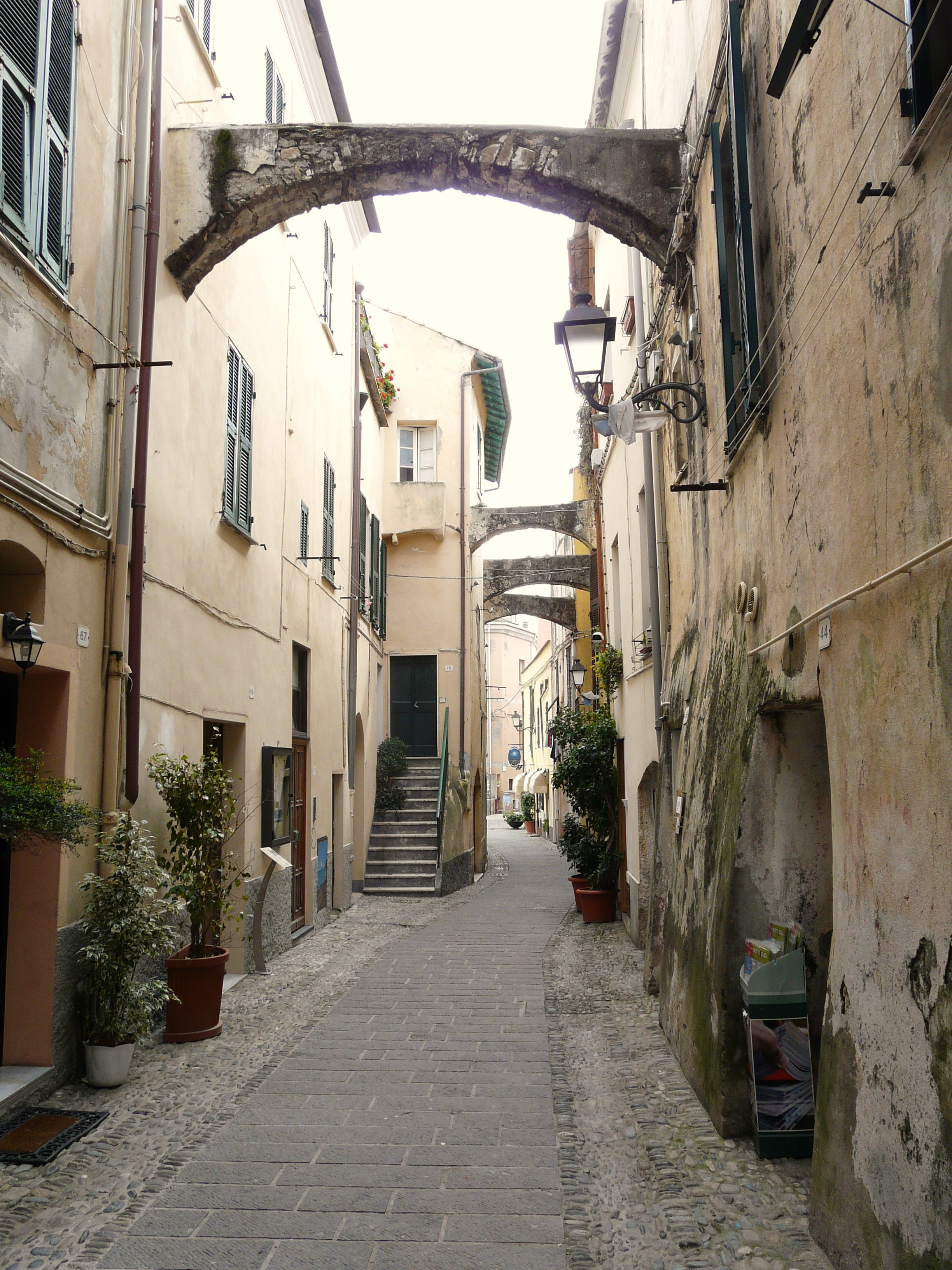 Caruggio di Santo Stefano al Mare, Liguria, Italia